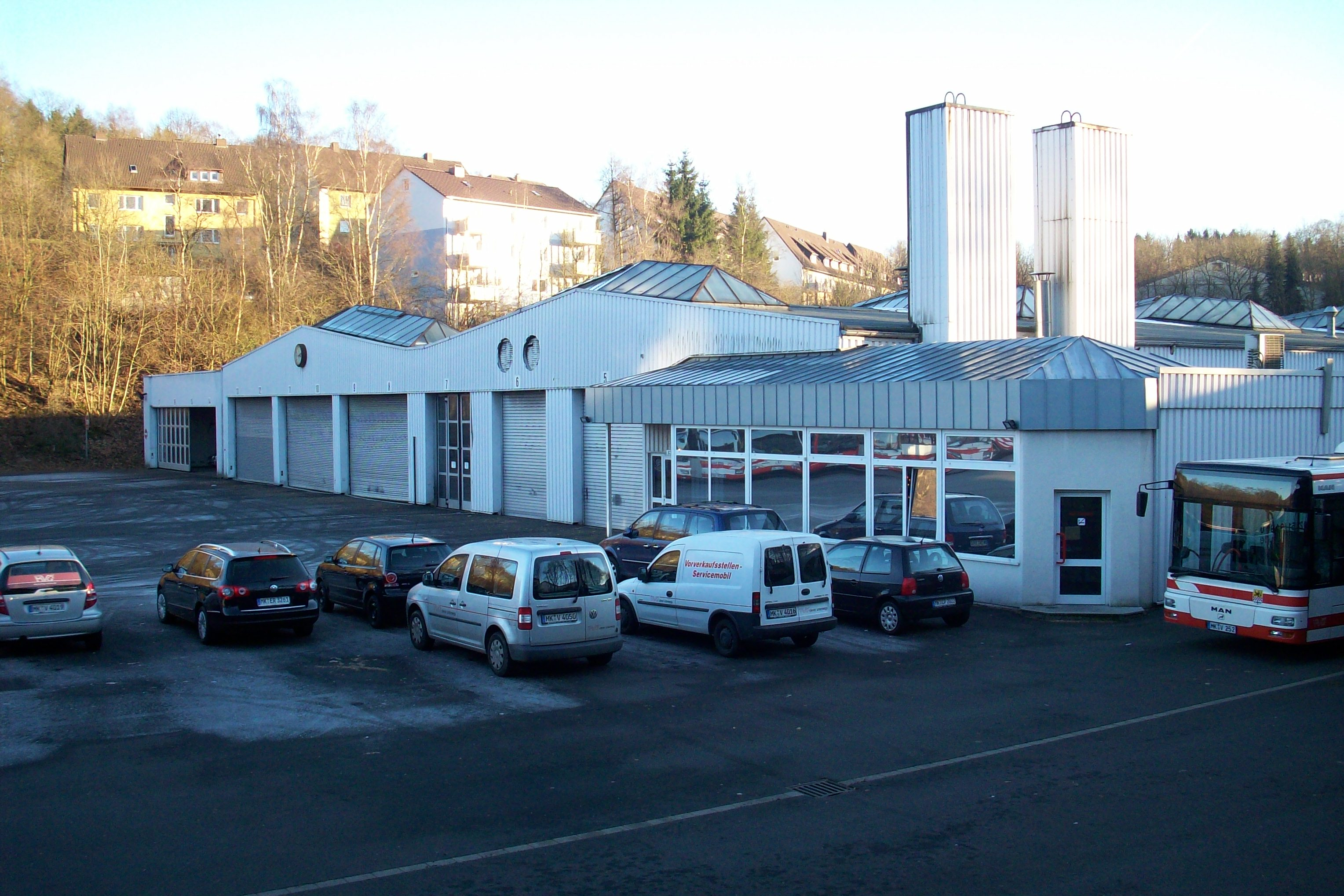 Die Betriebsstelle Lüdenscheid mit der Leitstelle der Märkischen Verkehrsgesellschaft GmbH (MVG) MVG Leitstelle und Betriebshof Lüdenscheid Leitstelle und Betriebshof der Märkischen Verkehrsgesellschaft GmbH in Lüdenscheid